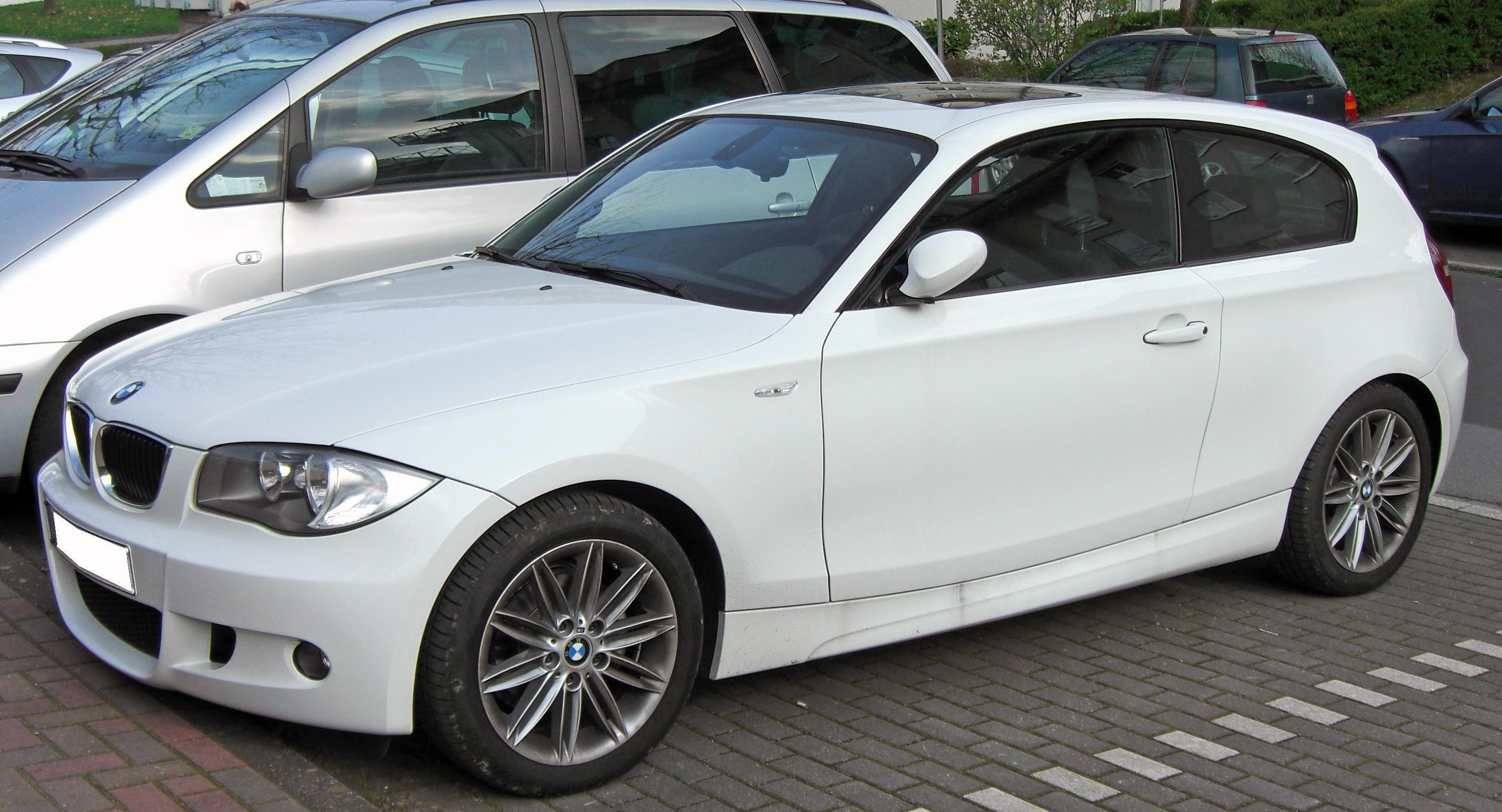 BMW 1er